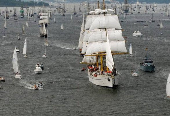 kiel segler windjammer